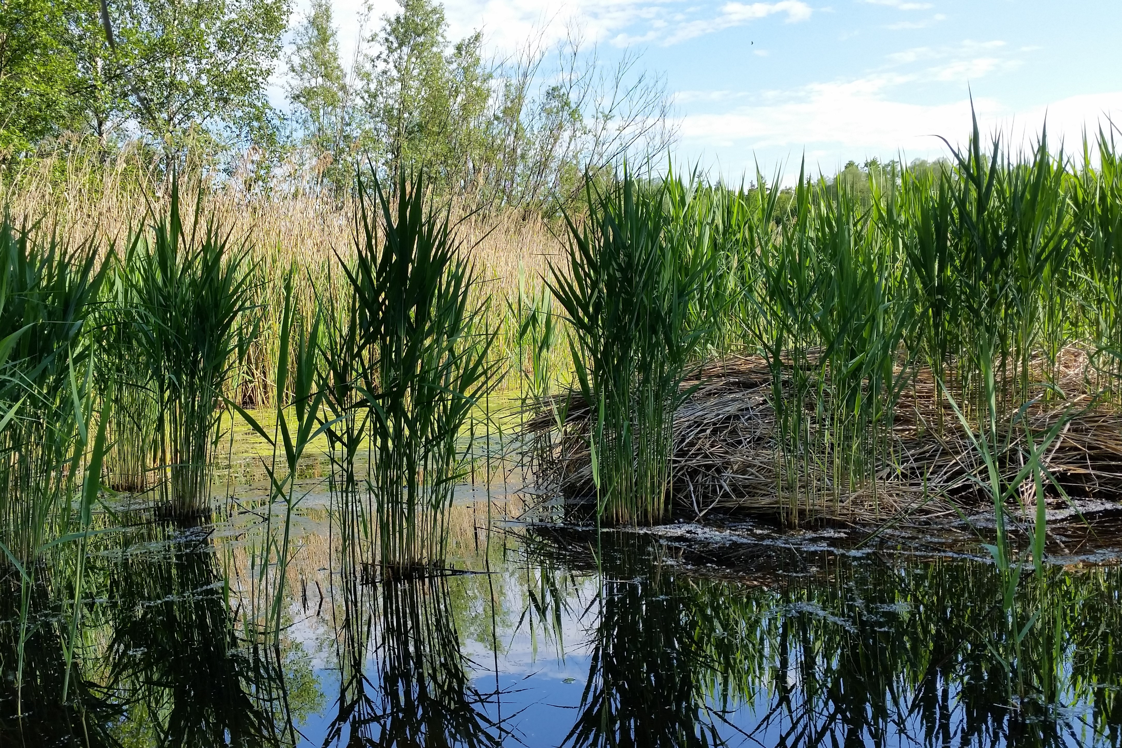 Bürmooser Moor This media shows the nature reserve in Salzburg with the ID NSG00028.